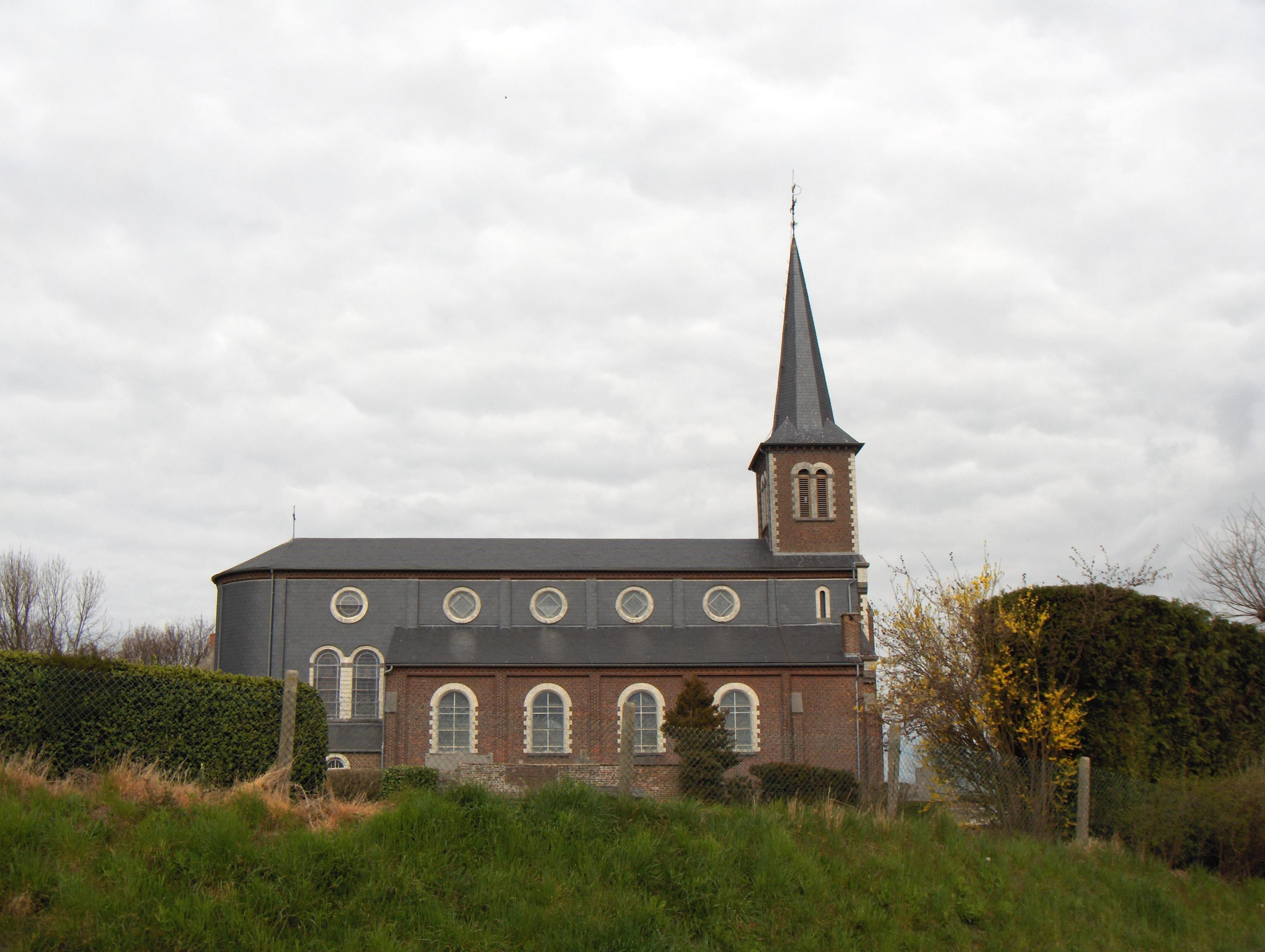 Offus, Ortsteil der Gemeinde Ramillies (Prov. Brabant Wallon, Belgien), Foillanuskirche (église Saint-Feuillien) aus 1864 (Architekt: E. Coulon).